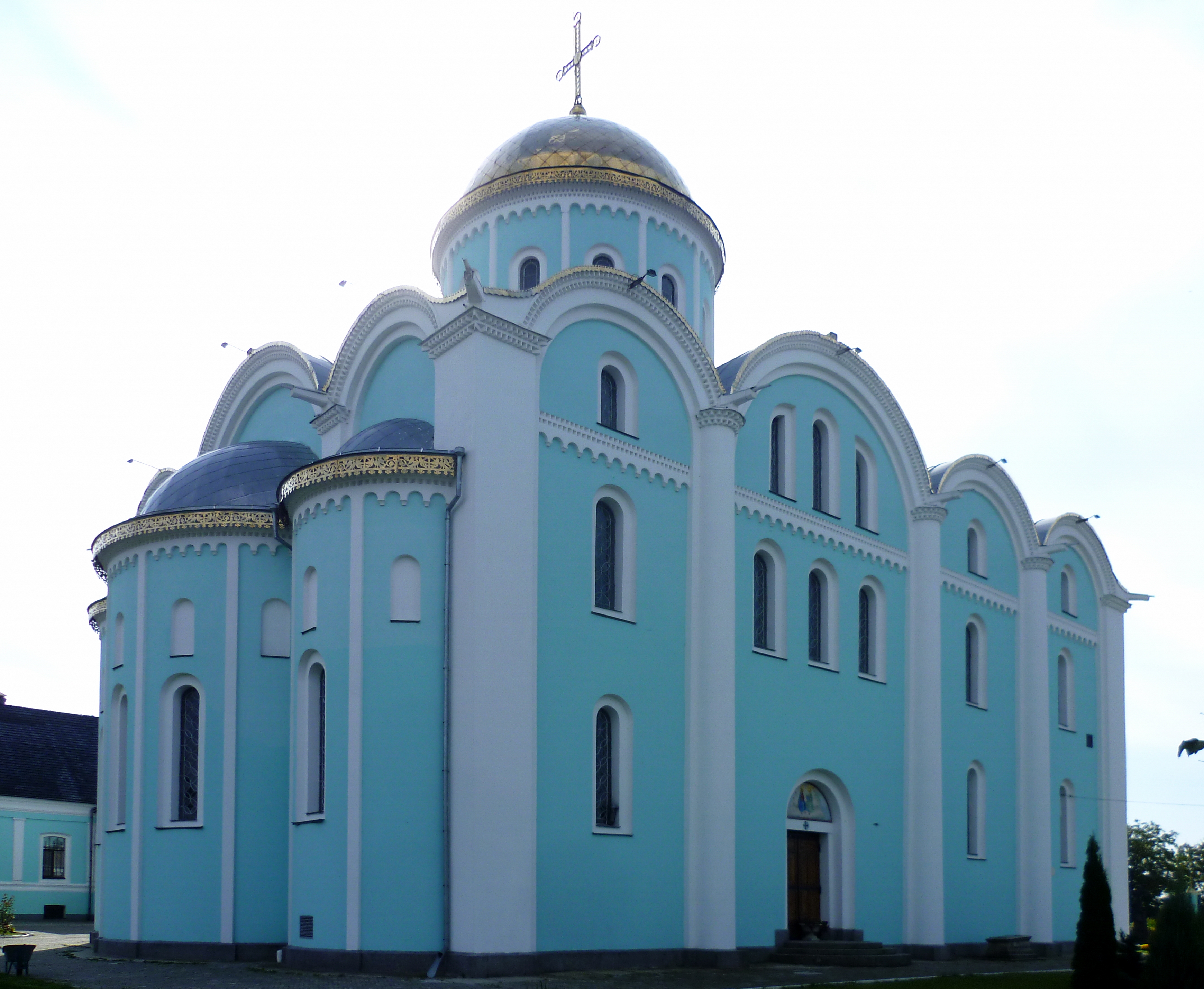 Успенський собор (Мстиславів храм) (мур.) (1156 рік) - вигляд з північного сходу - м.Володимир-Волинський (вул. Соборна, 25) Волинська область Україна